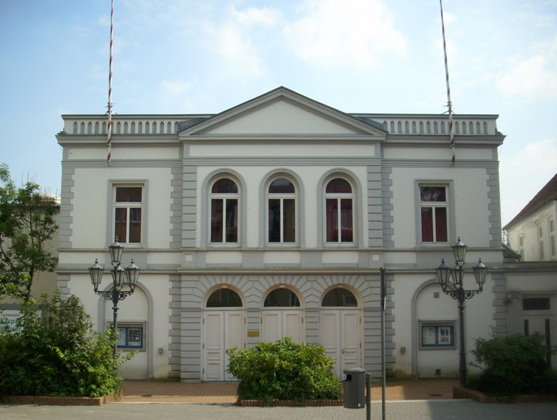 Teaterbygningen i Slesvig by